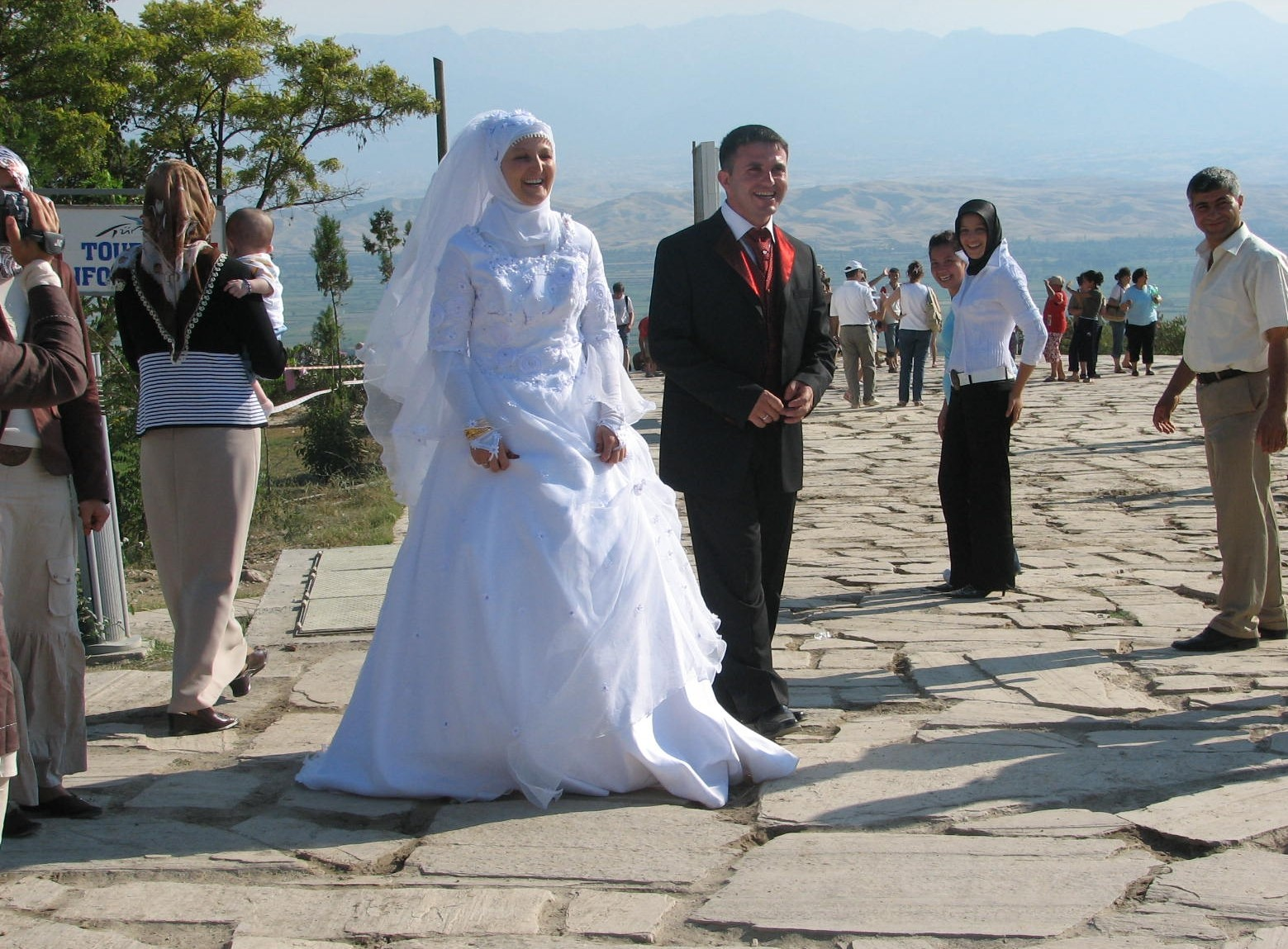 Ślub